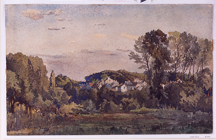 Drawing; Drawings